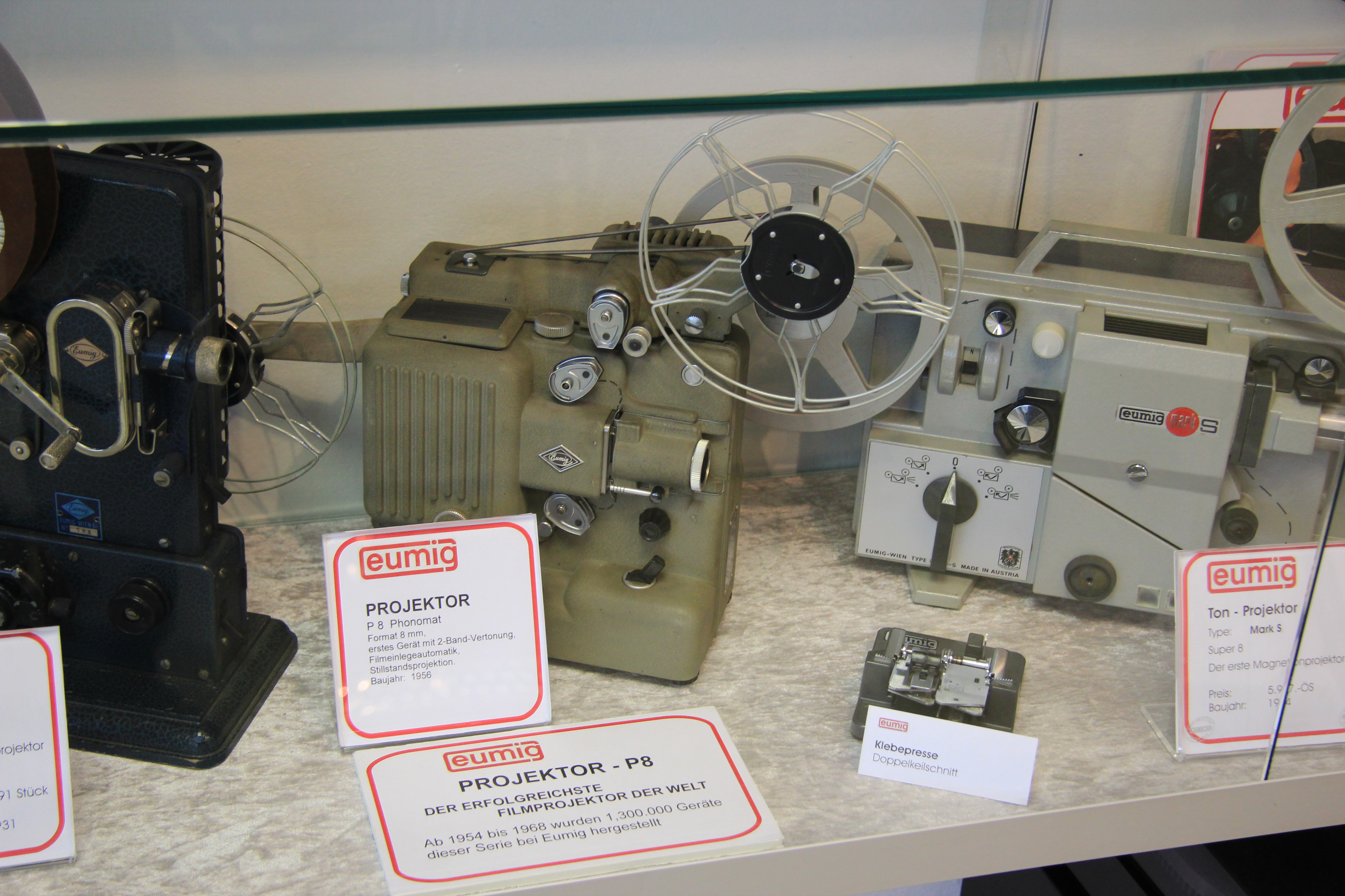 Ausstellungsstück(e) imEumig-Museum in Wiener Neudorf